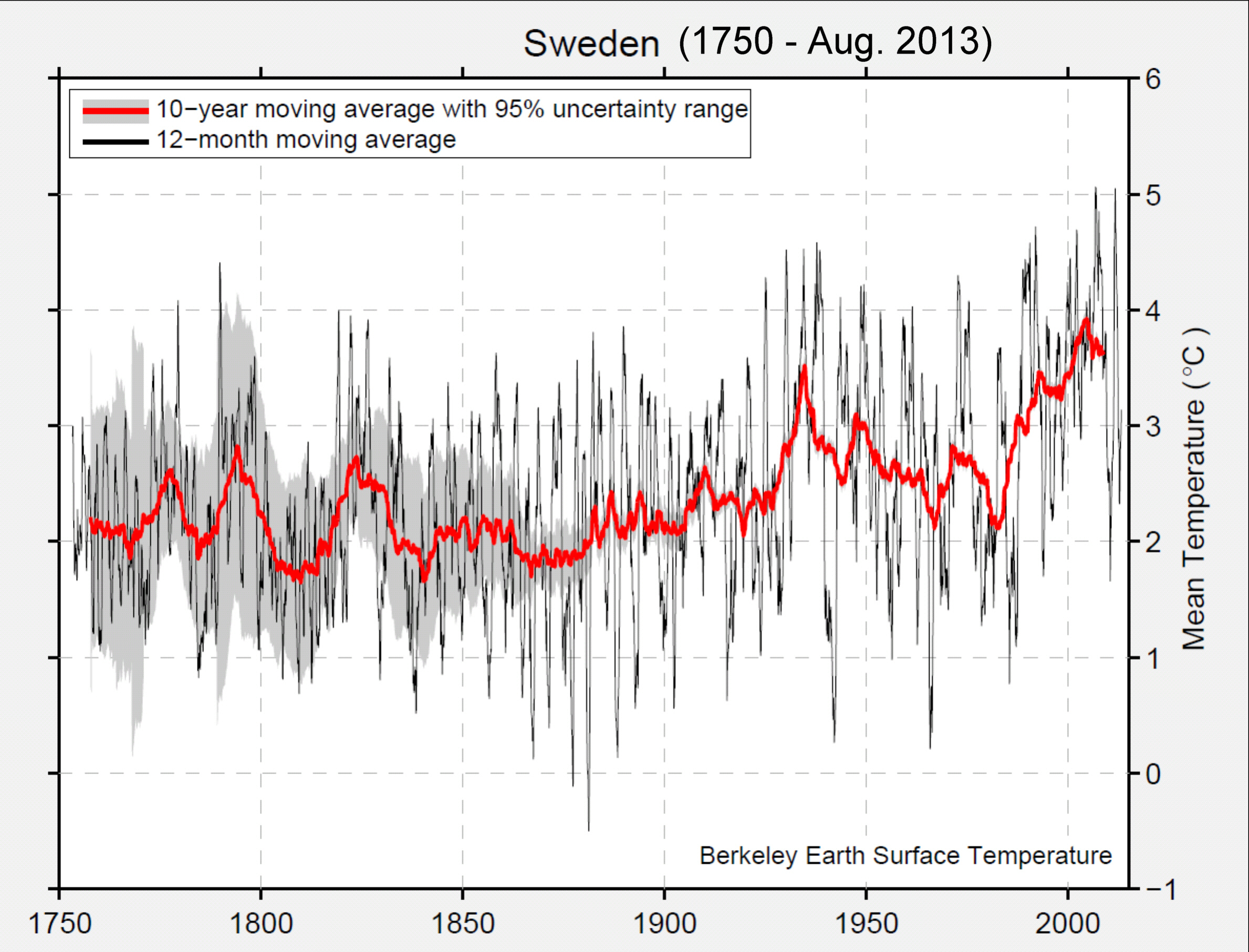 Mittlere Jahrestemperaturen in Schweden 1750 bis August 2013 als gleitende 12 Monatsmittel. 10-Jahresmittelwerte. - Originaldaten aller Wetterstationen, durch Berkeley Earth (USA) validiert und harmonisert